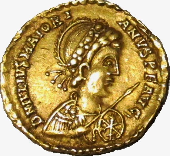 Impero d'occidente, maggioriano, solido in oro (arles), 457-461 (obverse)